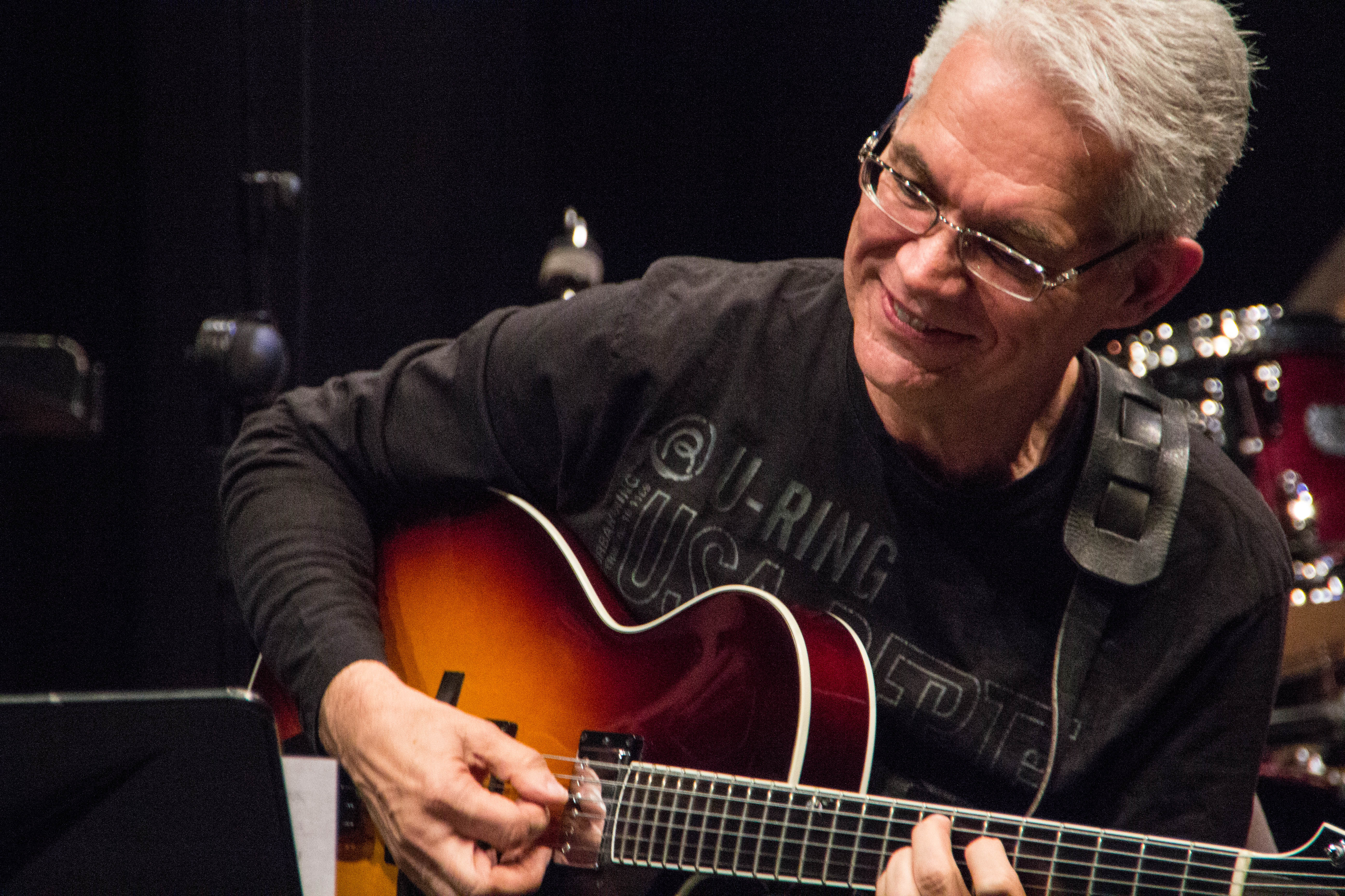 Concert in Germany 2013, Picture By Melody McLaren